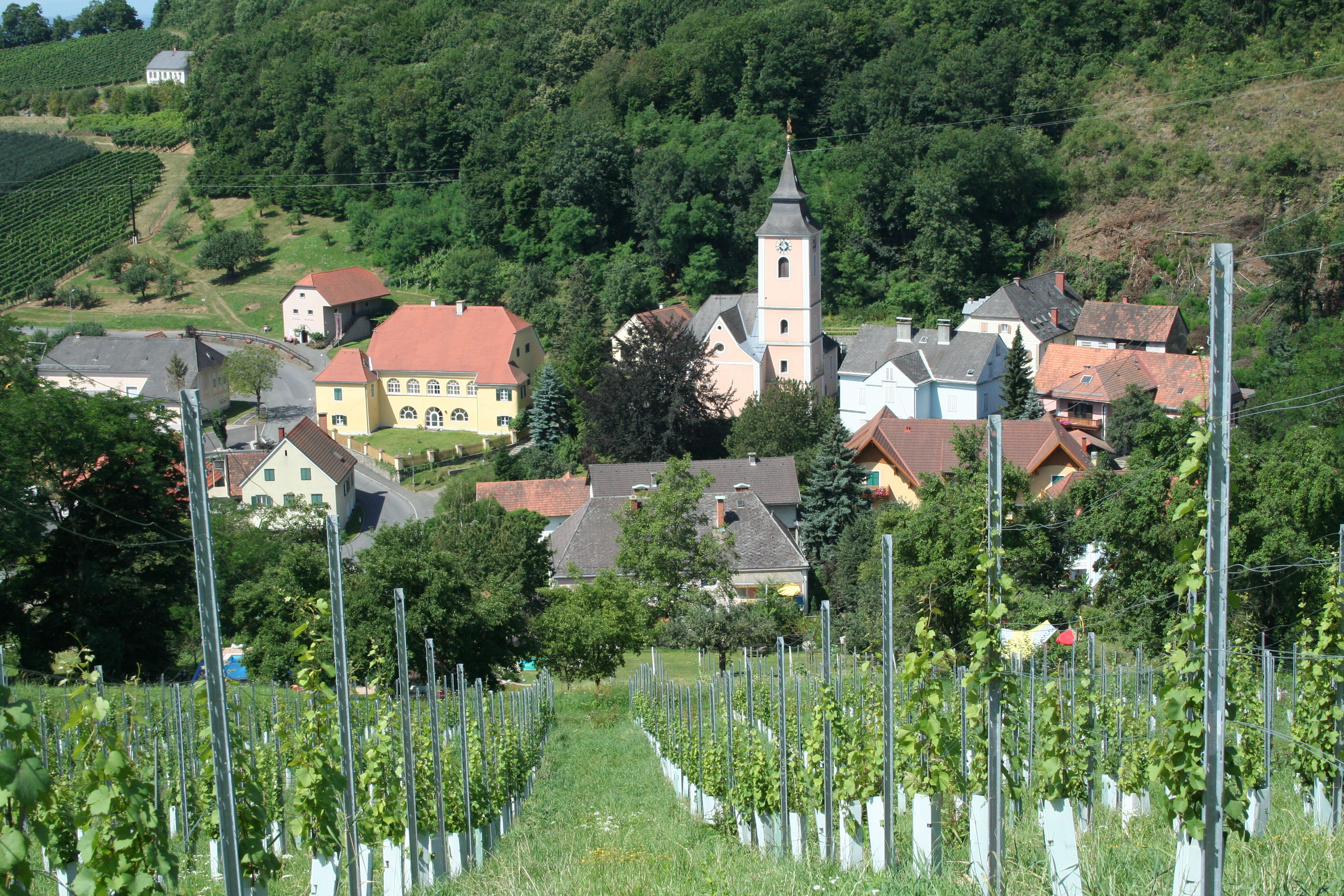 Klöch